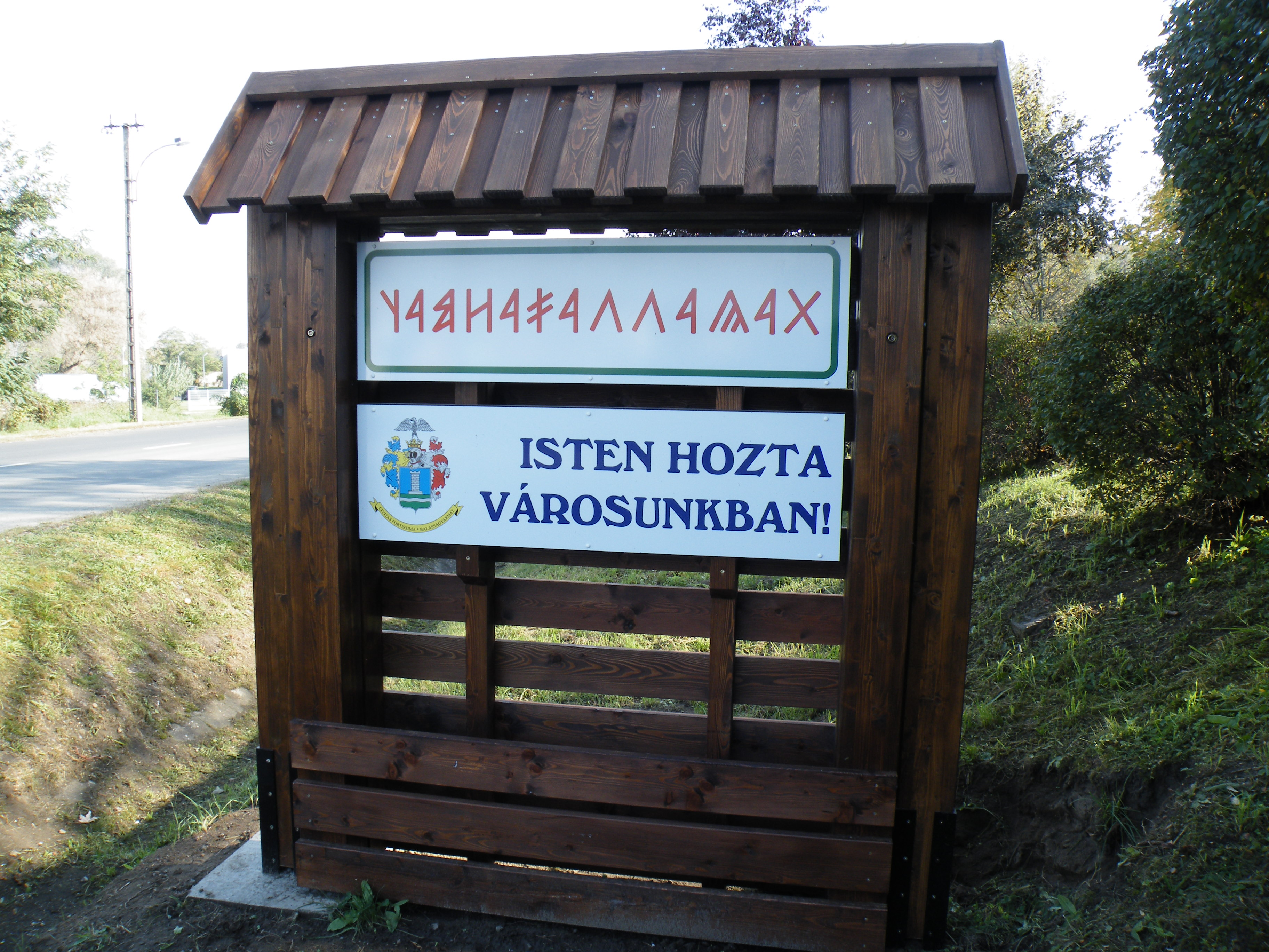 Üdvözlő tábla rovásfelirattal Balassagyarmaton